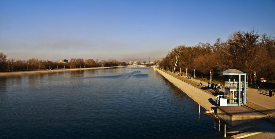 Гребната база през есента